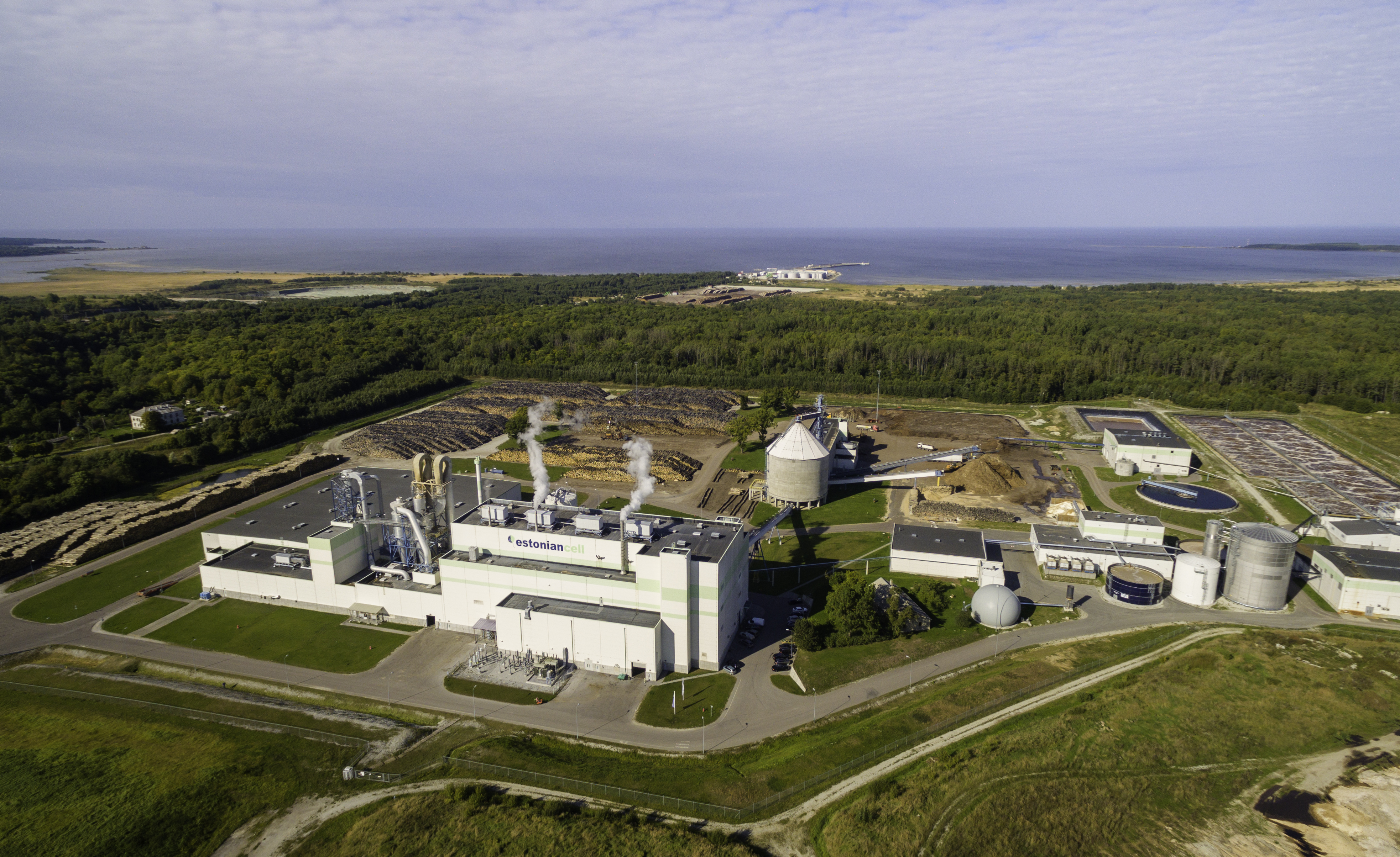 Estonian Cell tootmishooned.